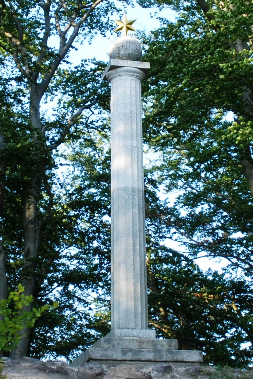 Ottův sloup na Ottově výšině v lázeňských lesích města Karlovy Vary